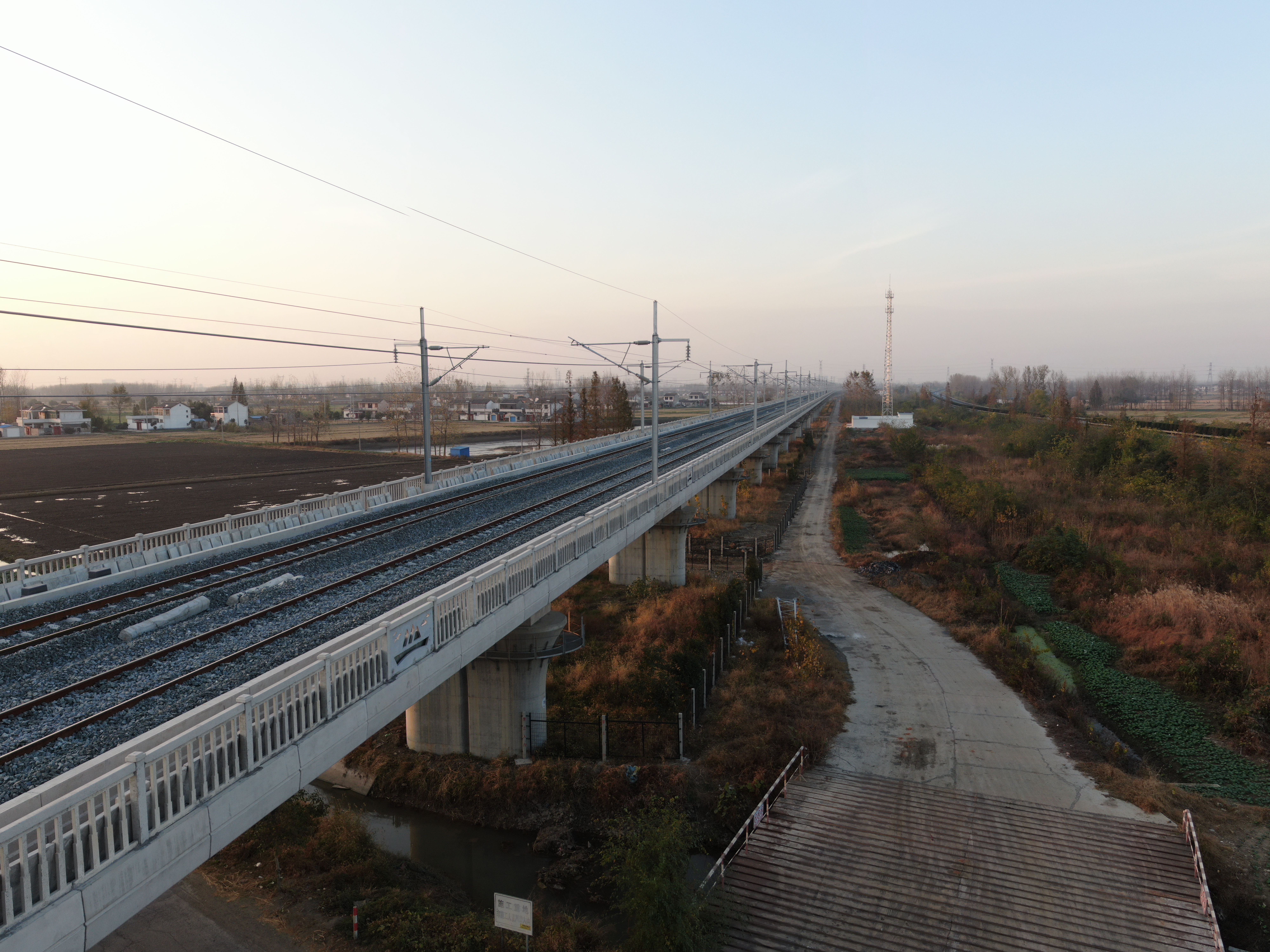 2019-11-20 拍摄 建设完成的连镇铁路